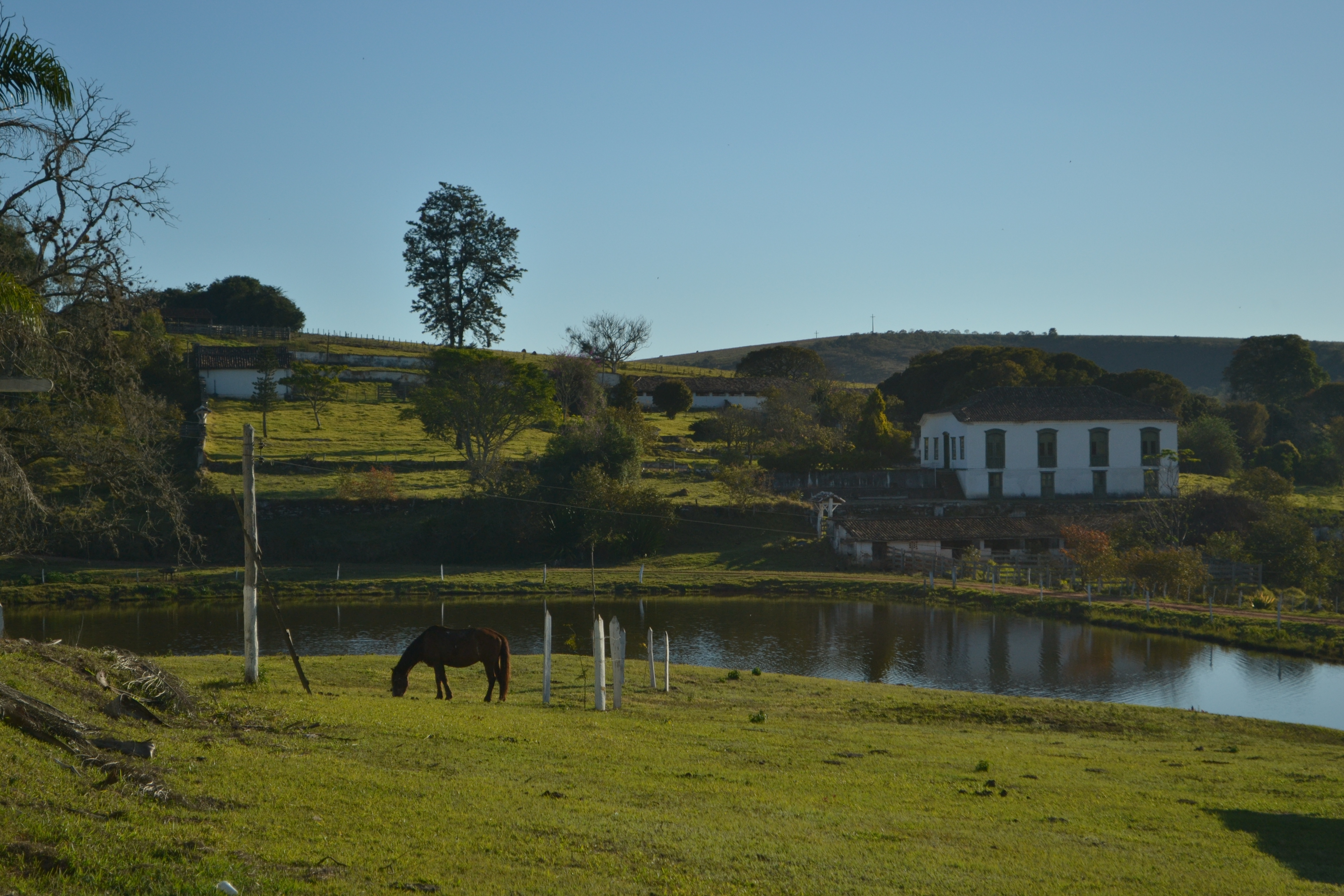 Antiga e mais importante sede da Família Junqueira